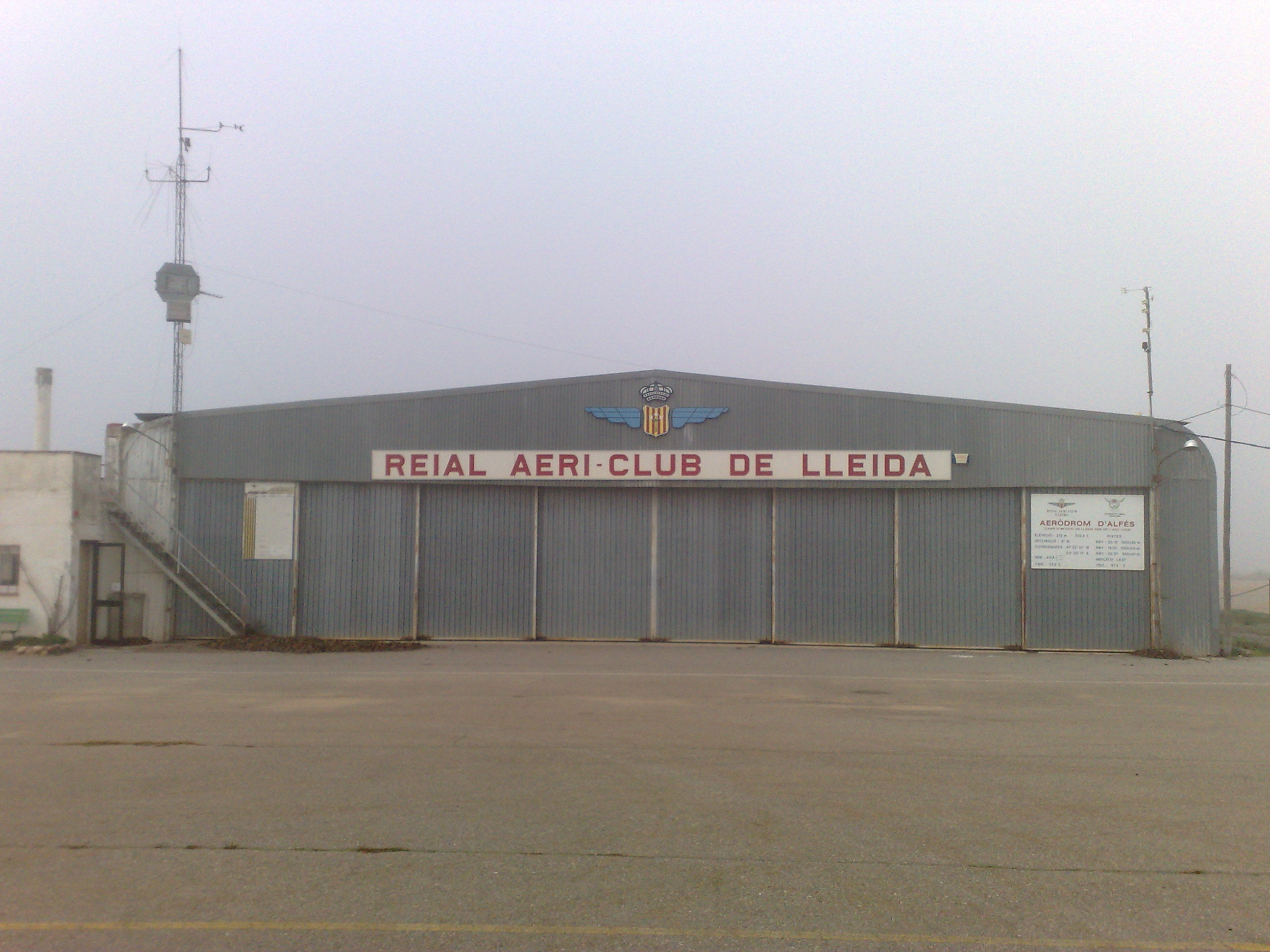 Hangar principal de l'aeròdrom d'Alfés, al Segrià.